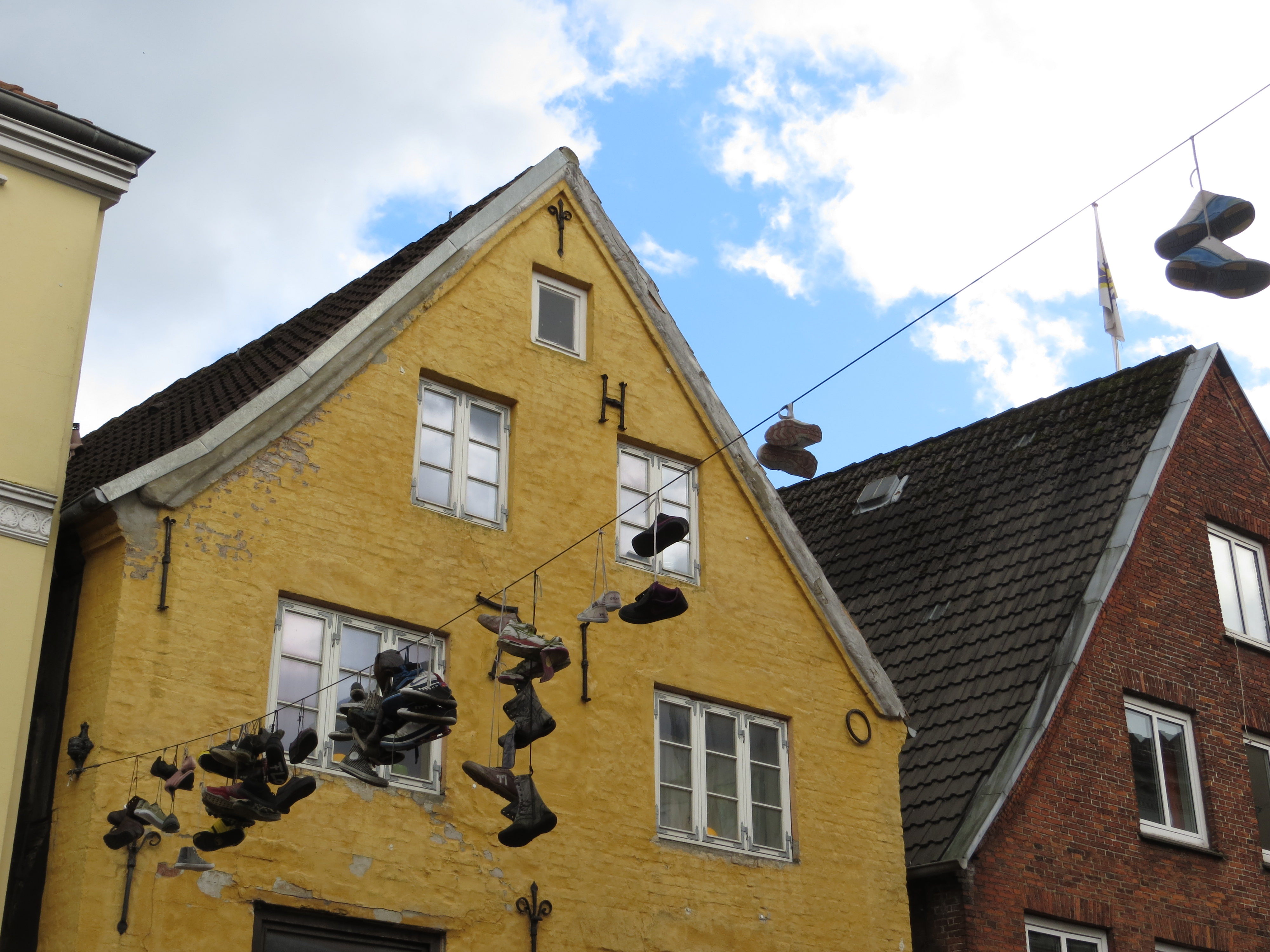 Hängende Schuhe in der Norderstraße, Flensburg, Bild 01